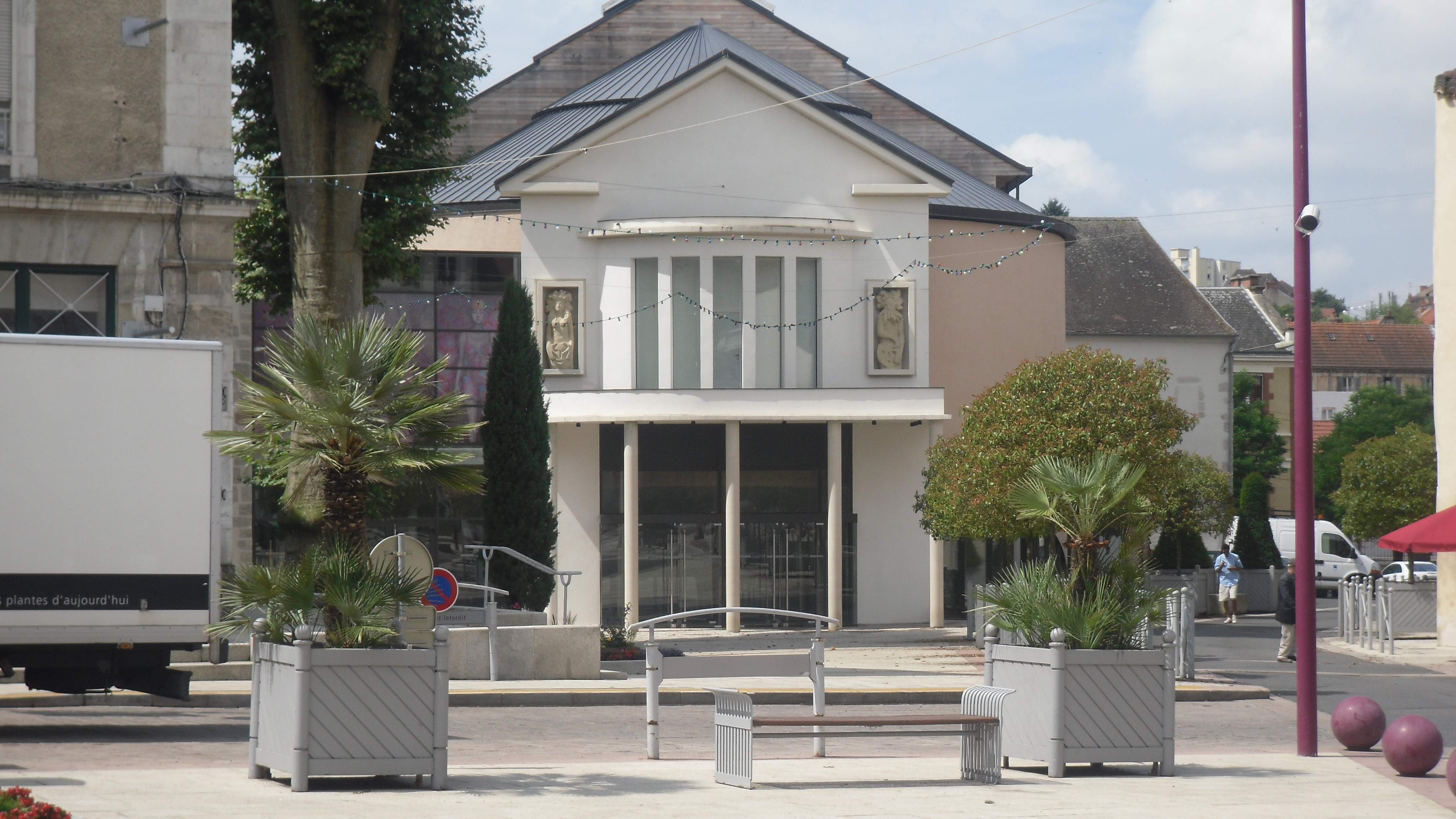 Le théâtre de Cusset après sa rénovation